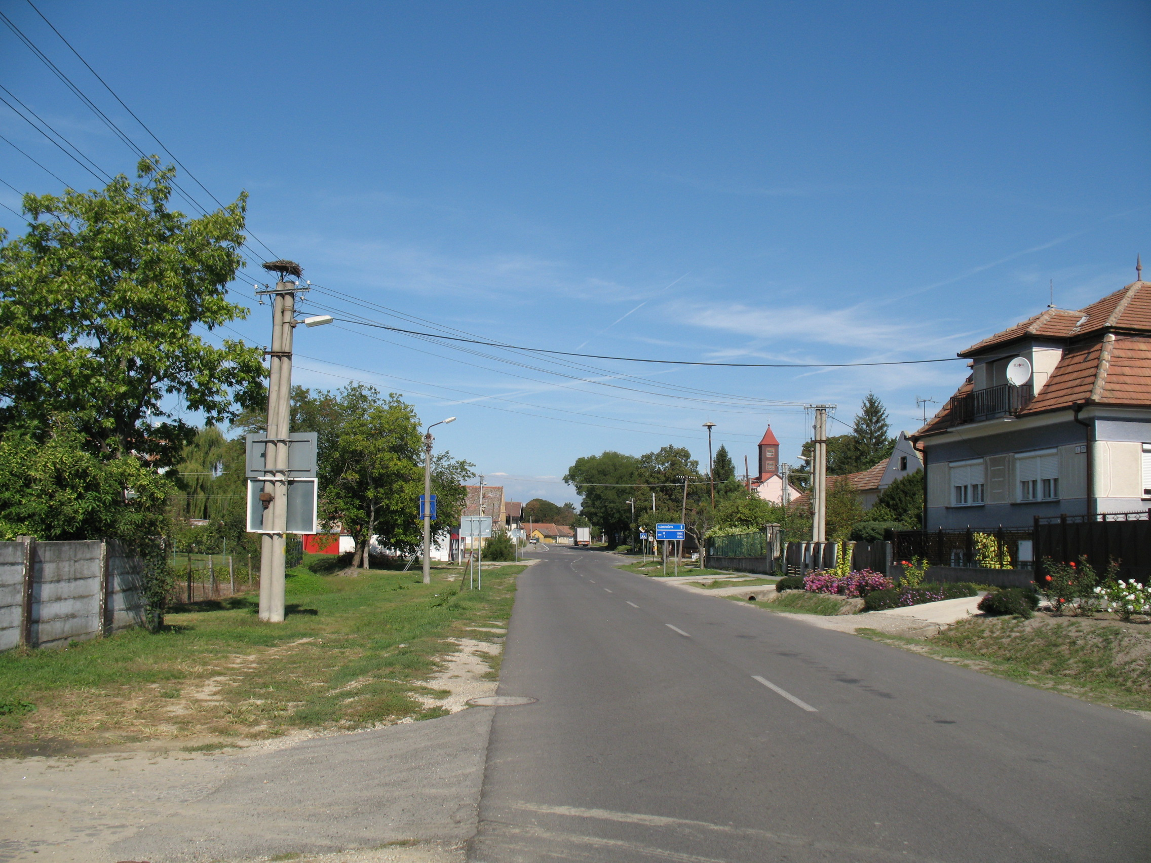 Nagyfödémes